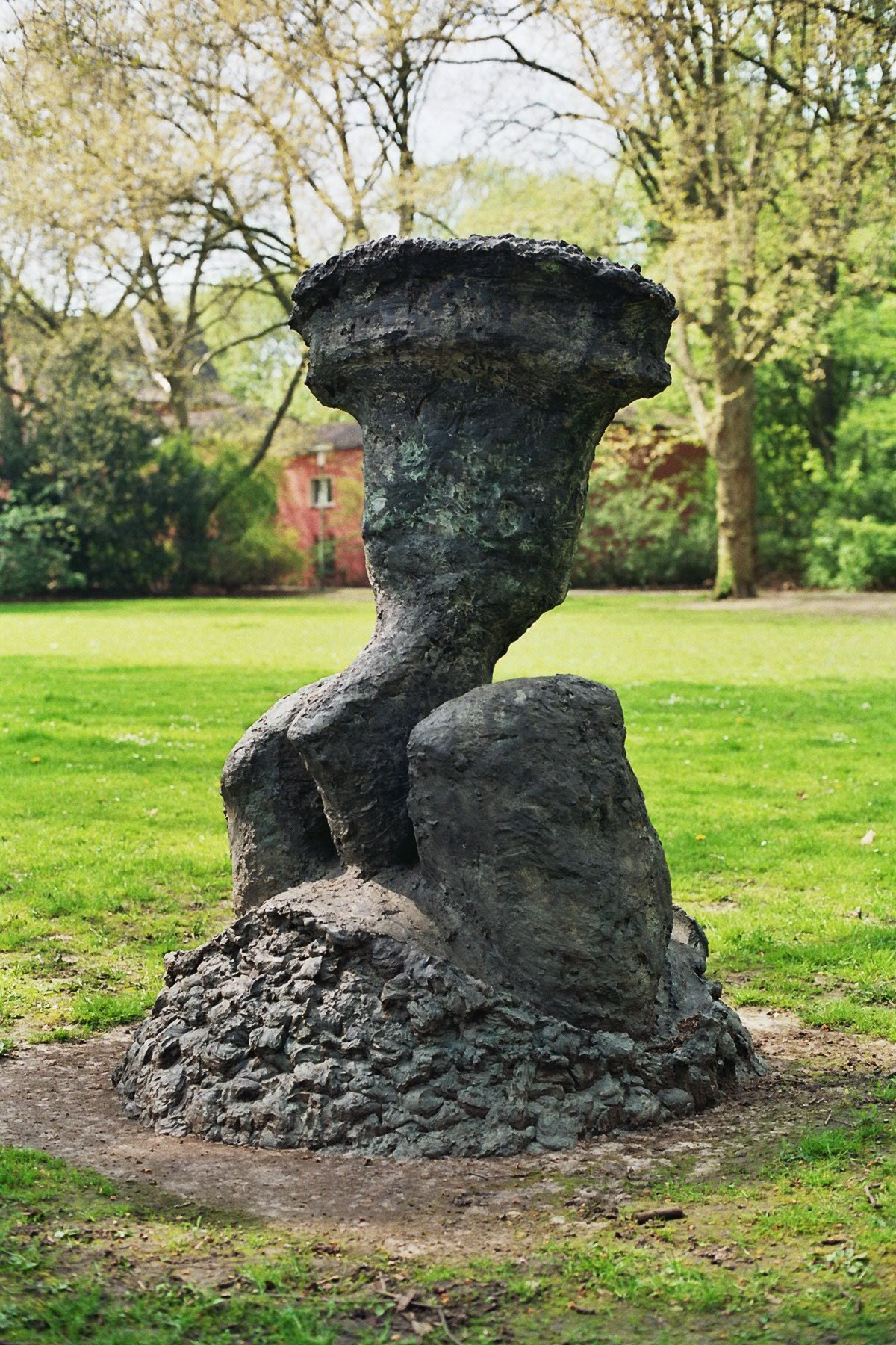 Skulptur Lebensgroesse von Heinz Breloh